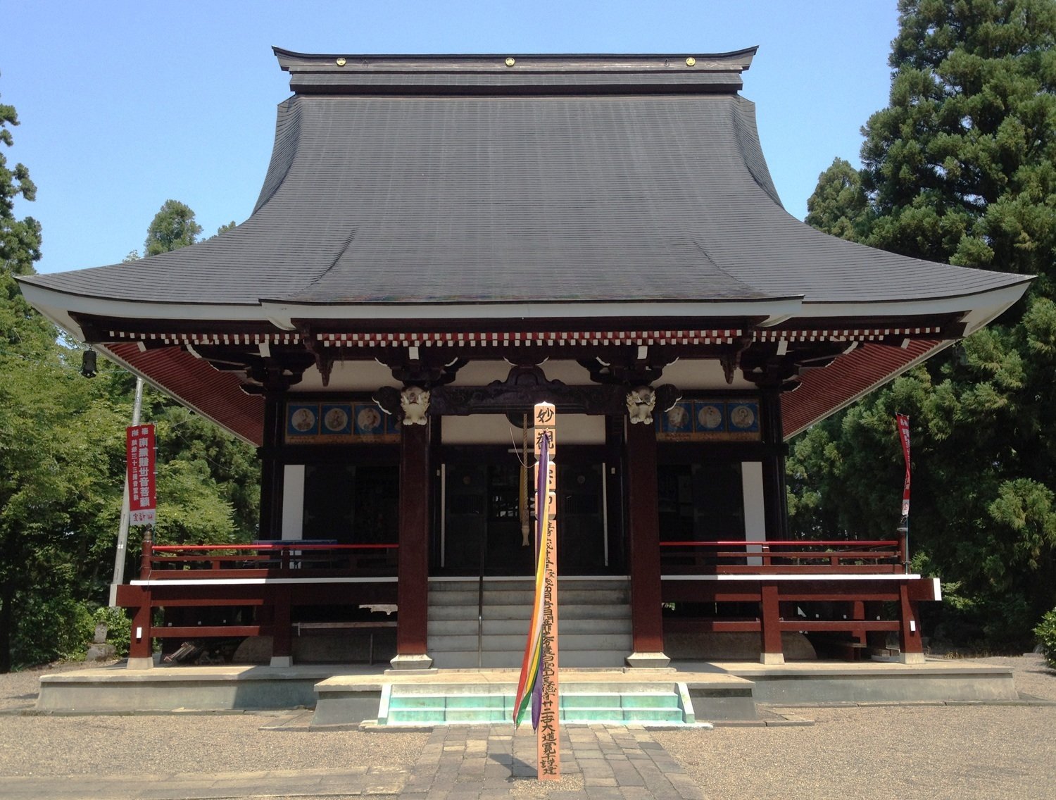 長徳寺千手観音堂